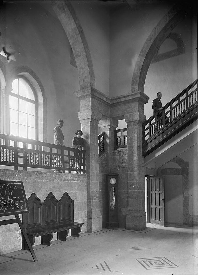 Historical images of Haifa תמונות היסטוריות של חיפה חיפה, בנין הטכניון בשכונת הדר הכרמל. מדרגות הלובי של הכניסה. צולם בין השנים 1922 ל- 1933